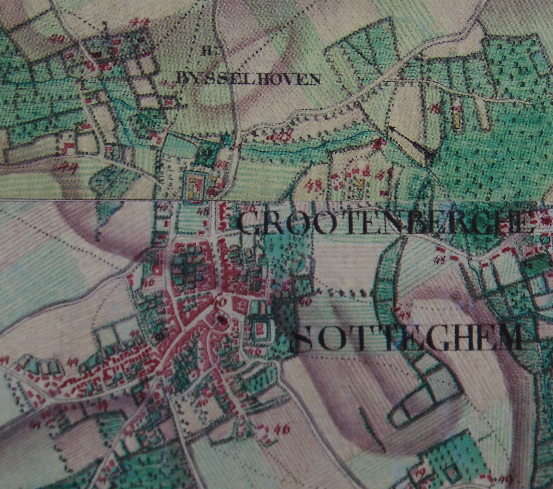 Zottegem, Ferrariskaart, 1777.